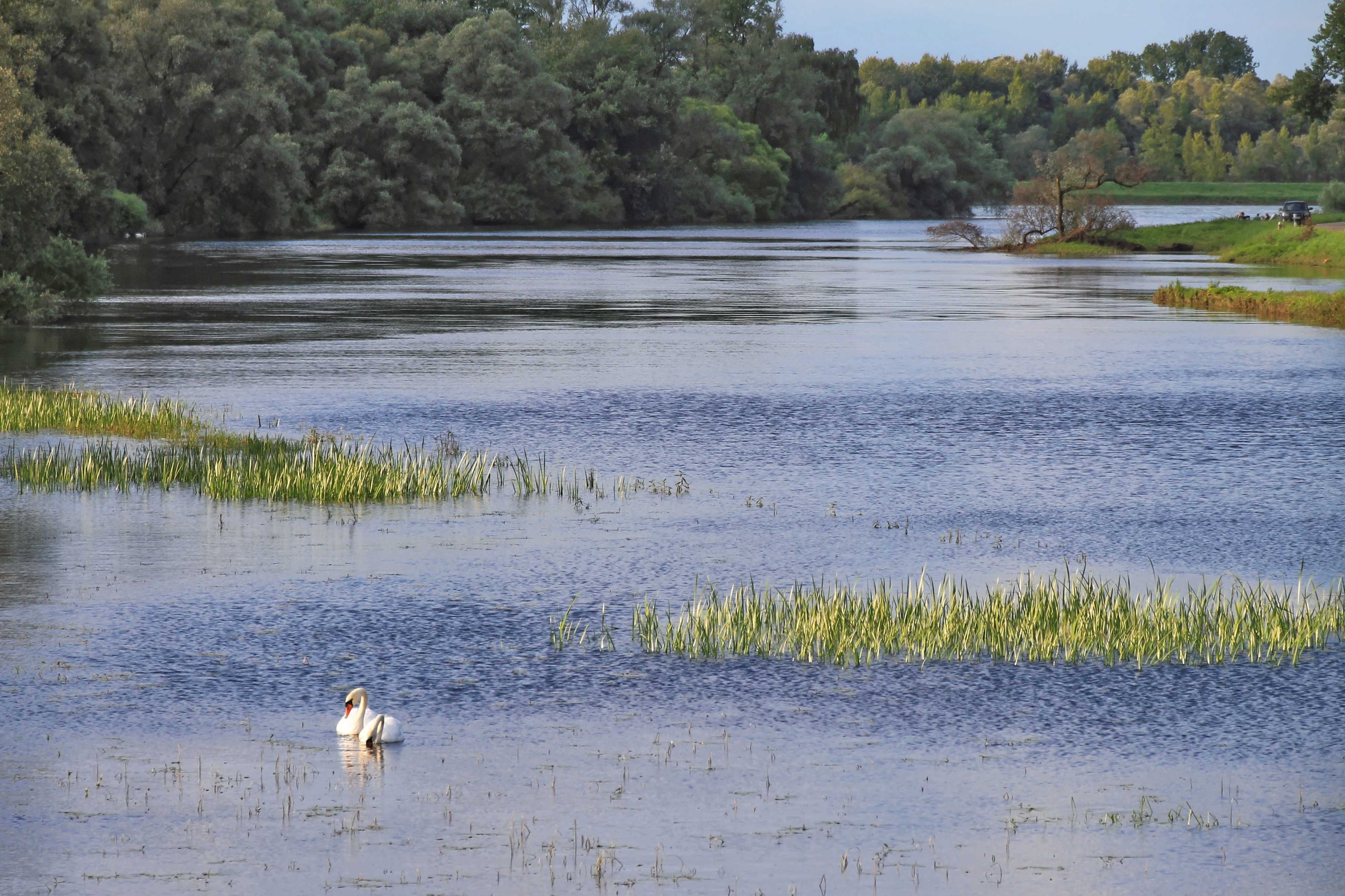 Naturschutzgebiet Rastatter Rheinaue (NSG 2.071) bei Steinmauern